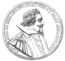 Nicolas de Bailleul (1586-1652), prévôt des marchands (1621-1627).